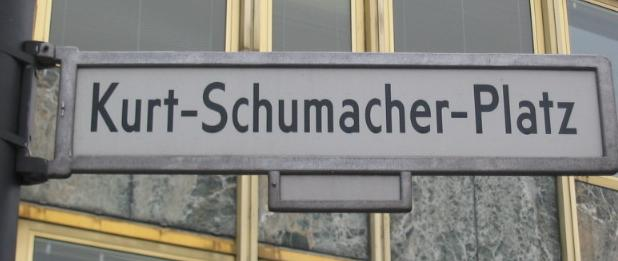 Straßenschild Kurt-Schumacher-Platz, Berlin-Reinickendorf